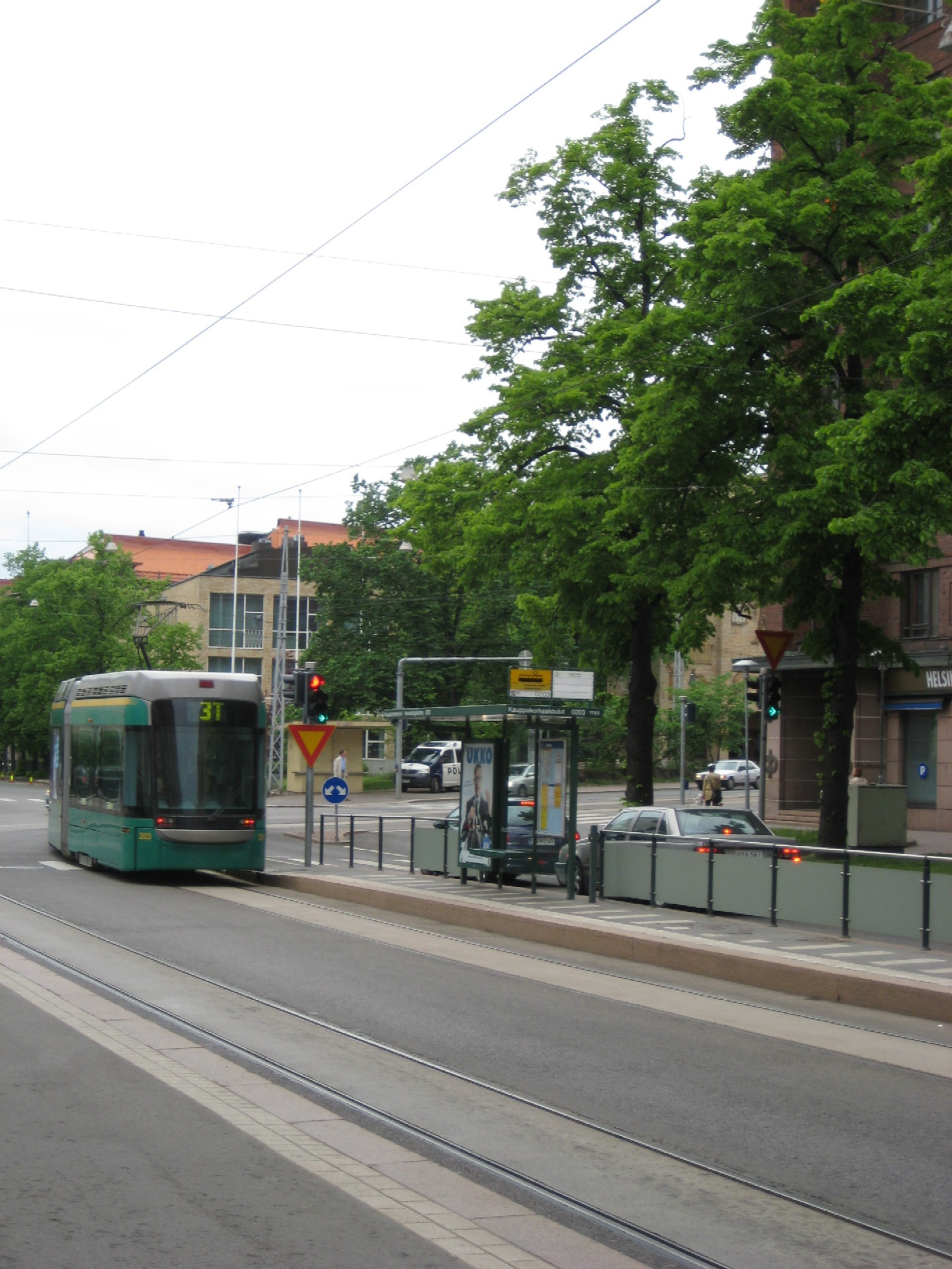 3T raitiovaunu Arkadiankadun ja Runeberginkadun risteyksessä Etu-Töölössä.